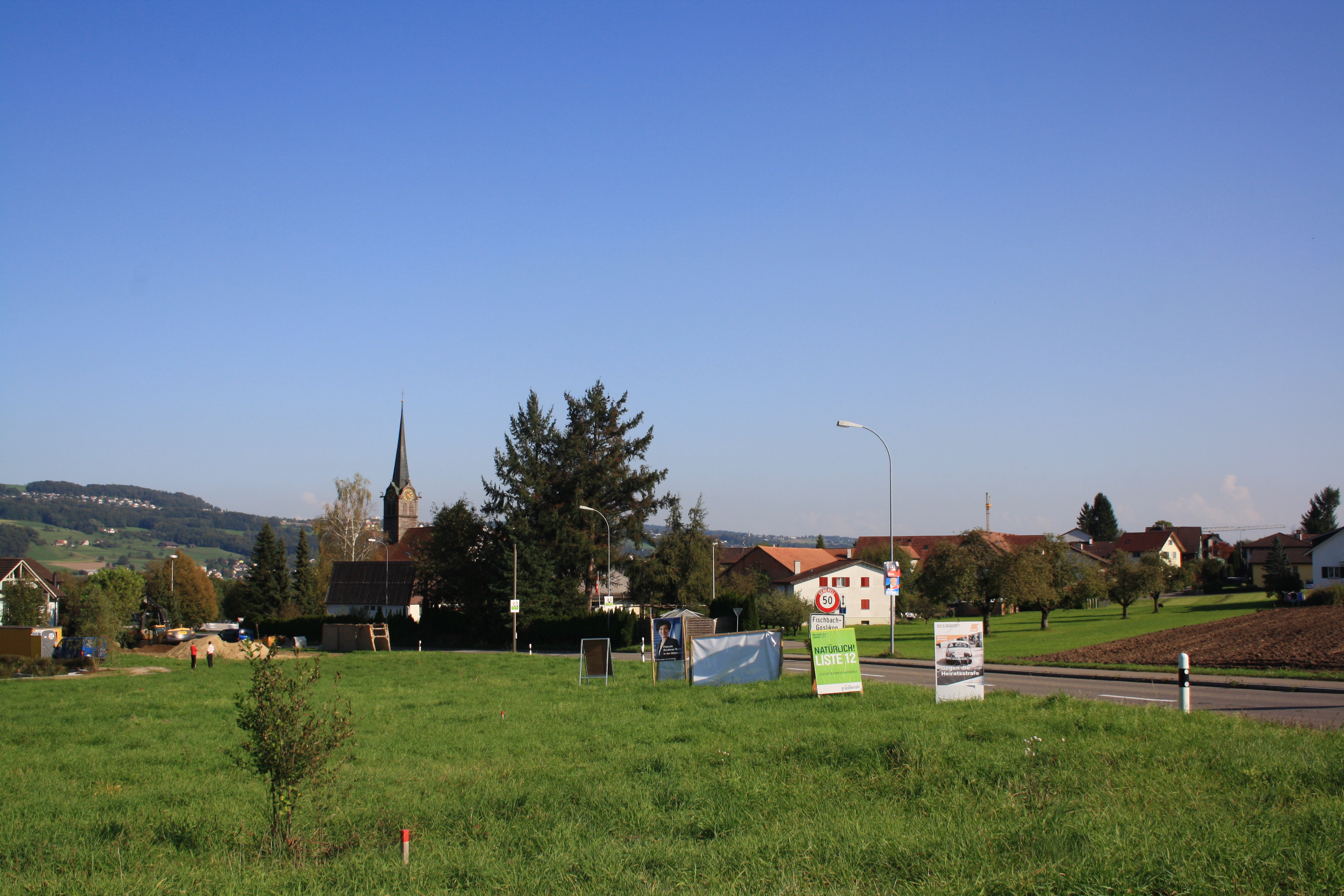 Göslikon